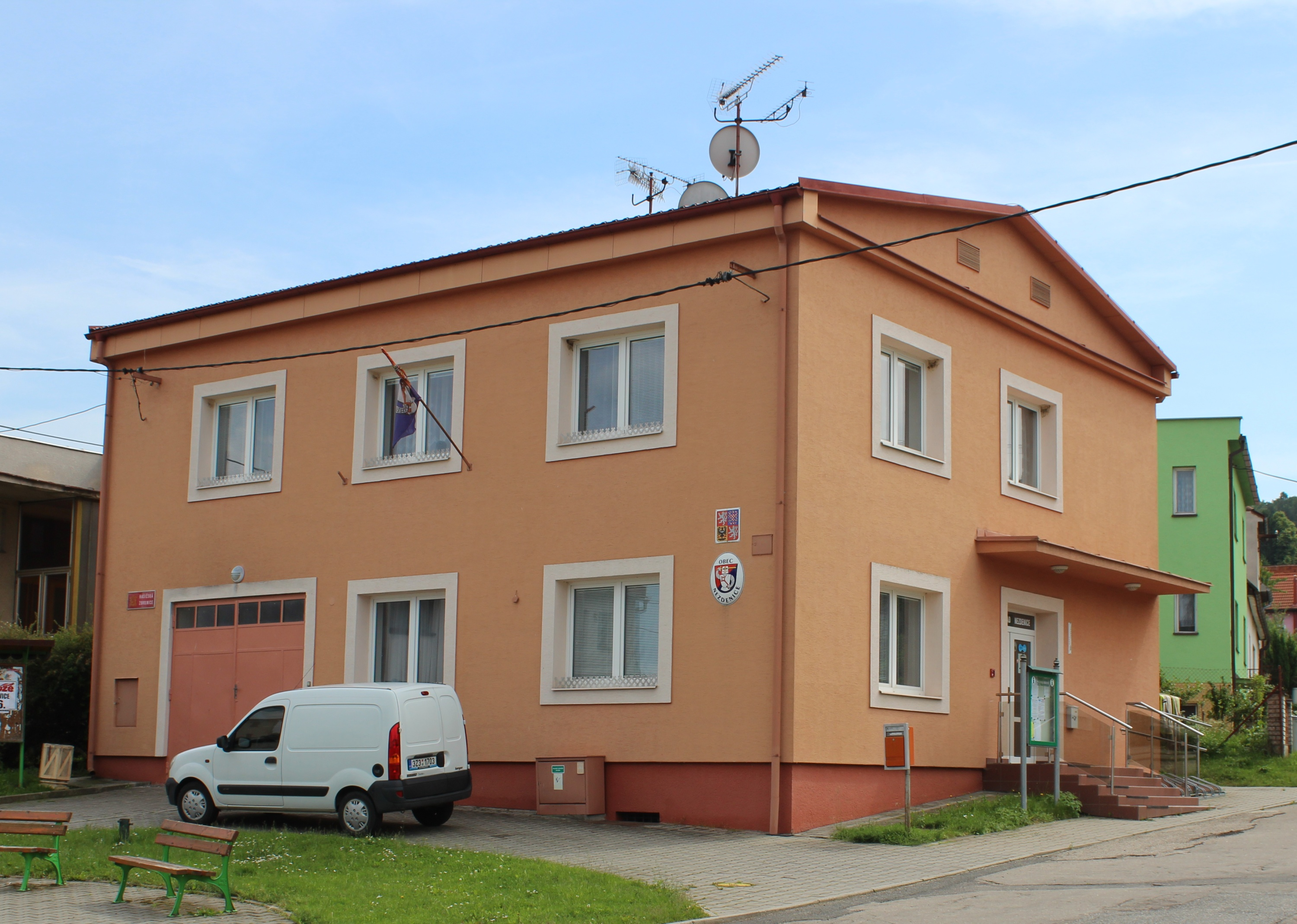 Nezdenice, obecní úřad.